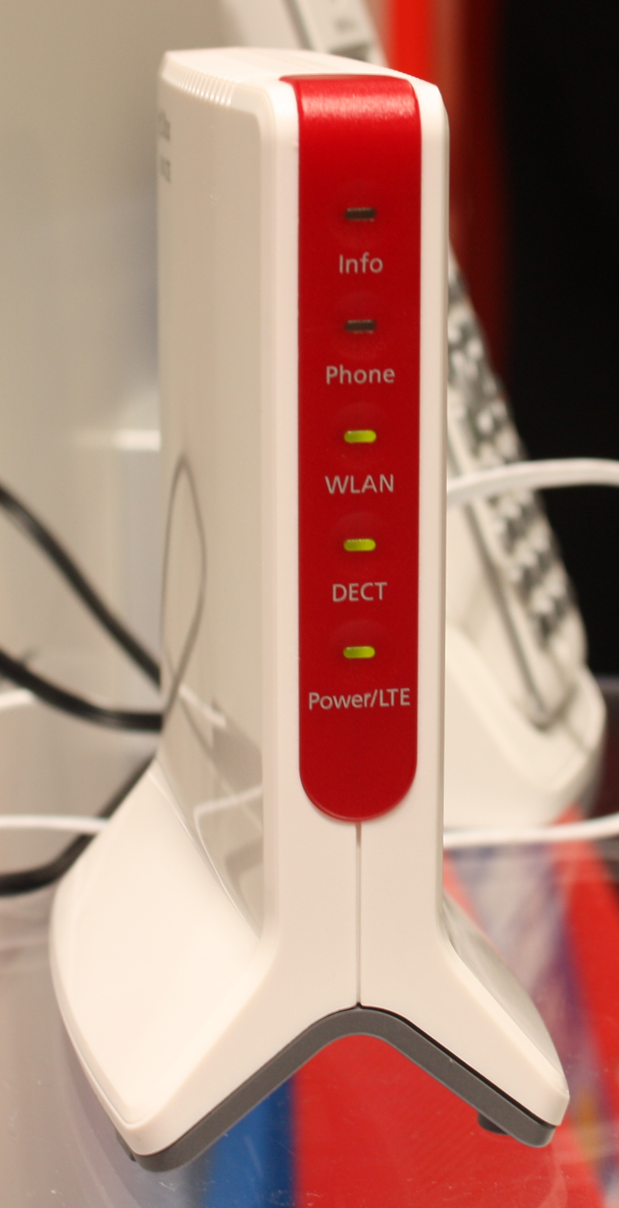 AVM FRITZ!Box 6810 LTE auf der Internationalen Funkausstellung Berlin 2012